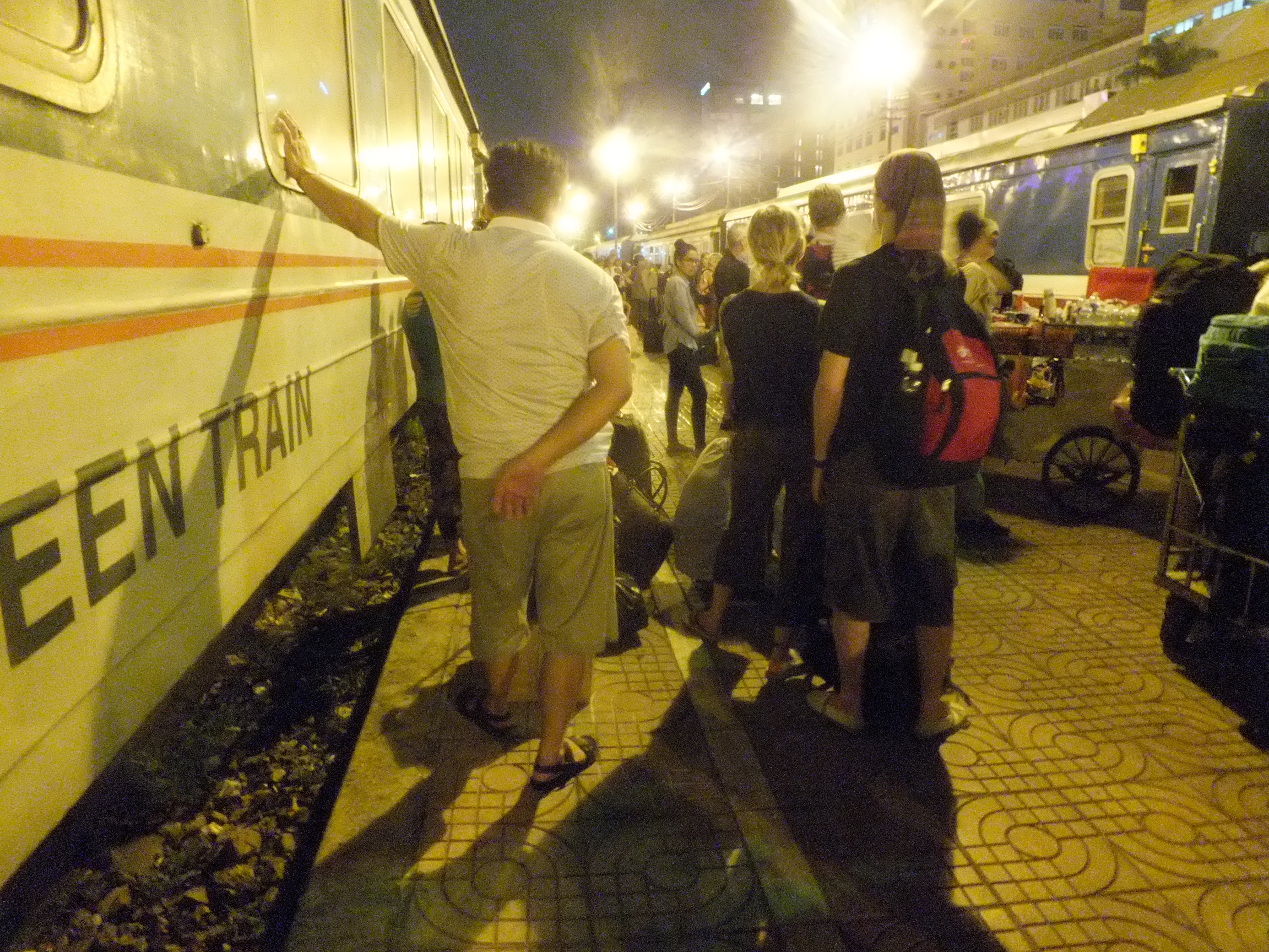 2013-07-15 Ga Ha Noi(Hanoi Station)ハノイ駅